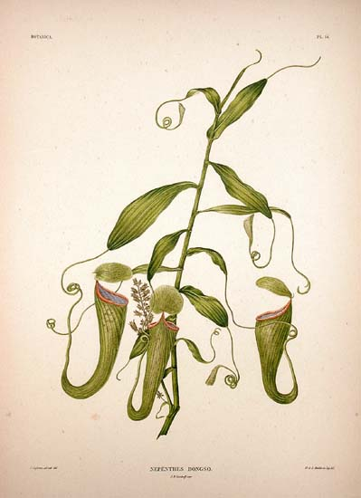 Print showing Nepenthes bongso. Original description: "From: Verhandelingen over de natuurlijke geschiedenis der Nederlandsche overzeesche bezittingen. Botanie by Pieter Willem Korthals. Leiden, S. en J. Luchtmans & C.G. van der Hoek, 1840, plate 14. Hand-coloured lithograph by A.S. Mulder after J. Gaijkema (uncut sheet 310 x 454 mm). Text missing."